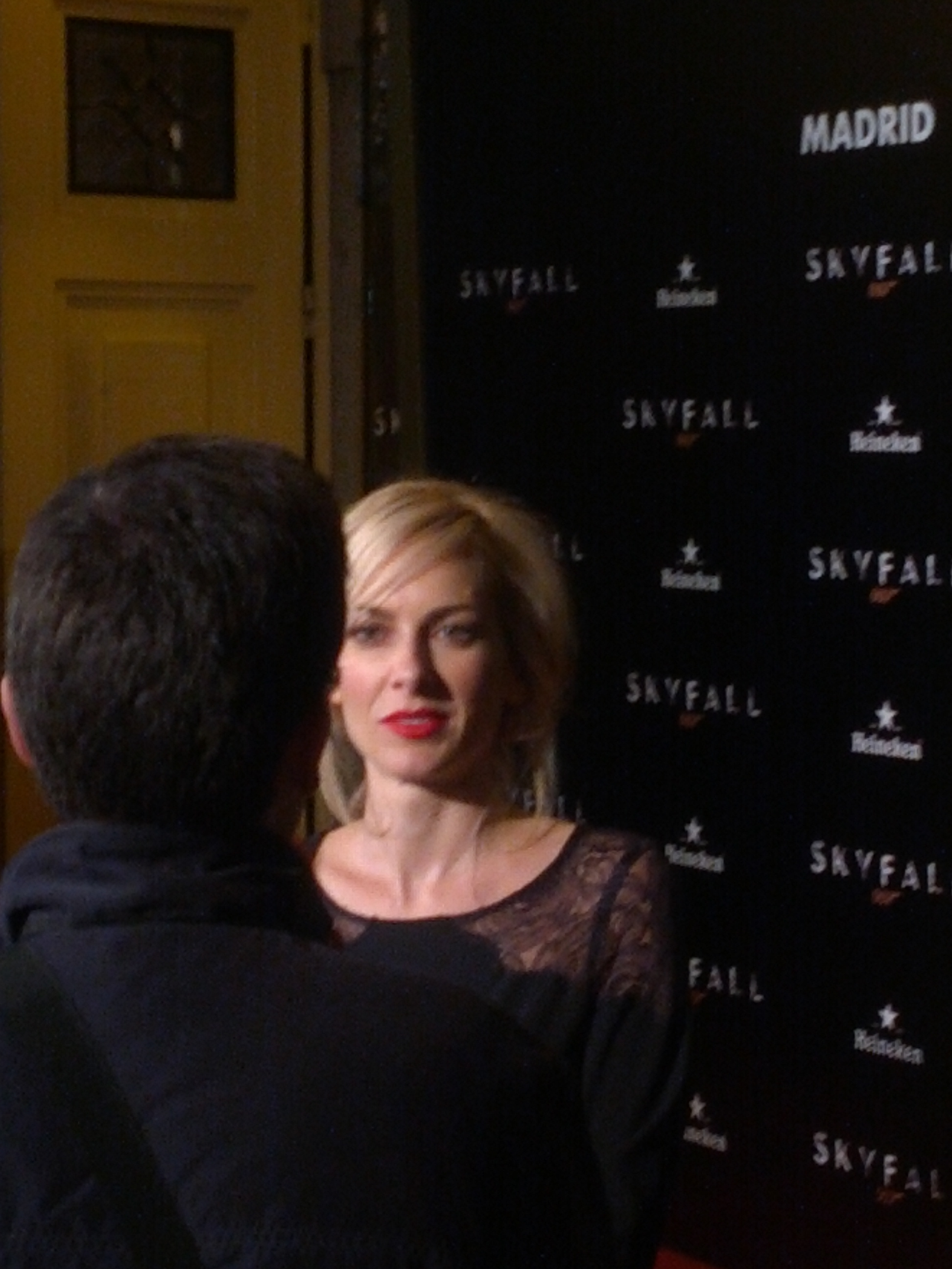 Kira Miró en el estreno de Skyfall